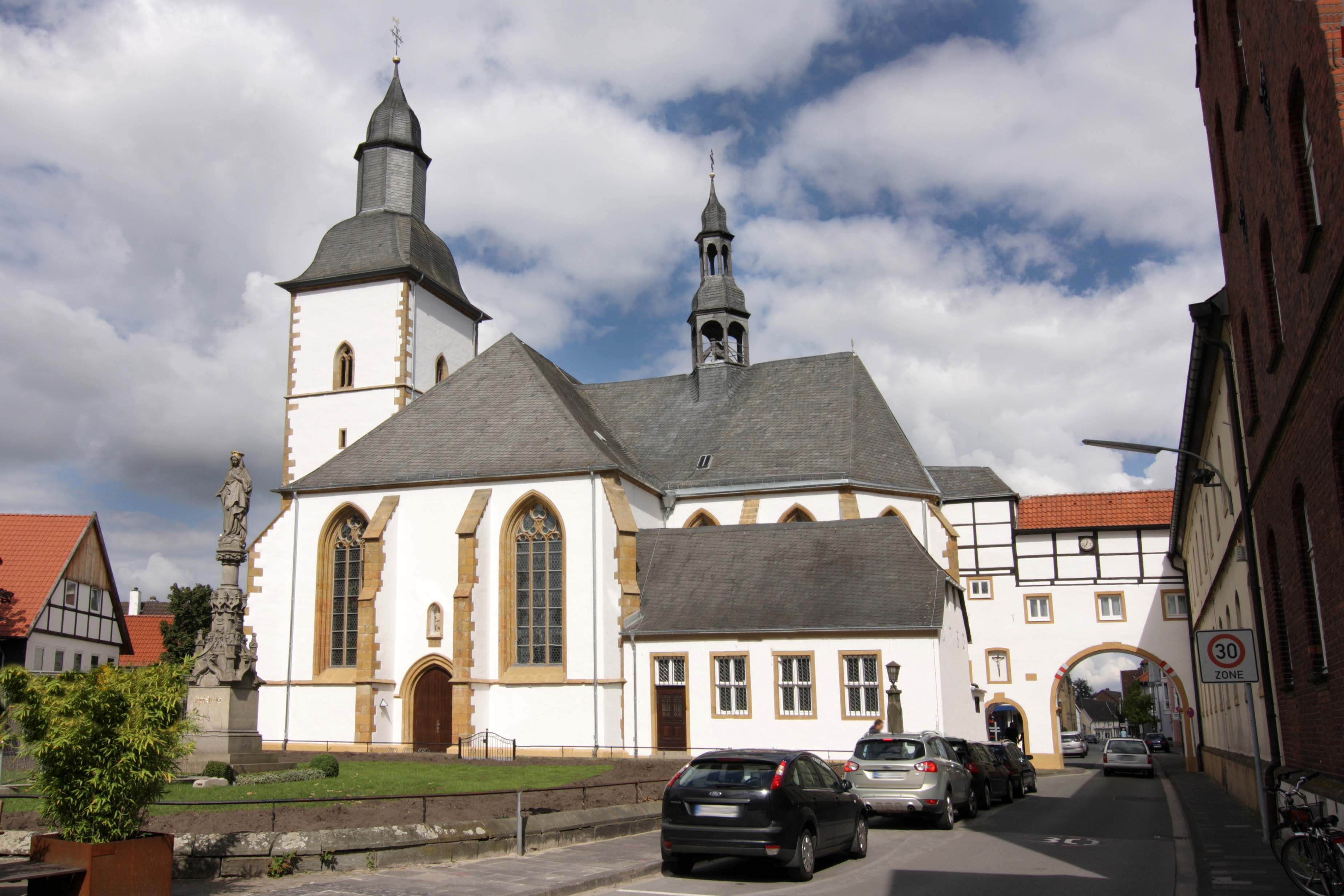 Marienkirche und Franziskanerkloster (Wiedenbrück). Kirche nach der Außenrenovierung 2010. Umbauarbeiten am Vorplatz dauern noch an. Motiv störende Verkehrszeichen wurden durch Bildbearbeitung entfernt.